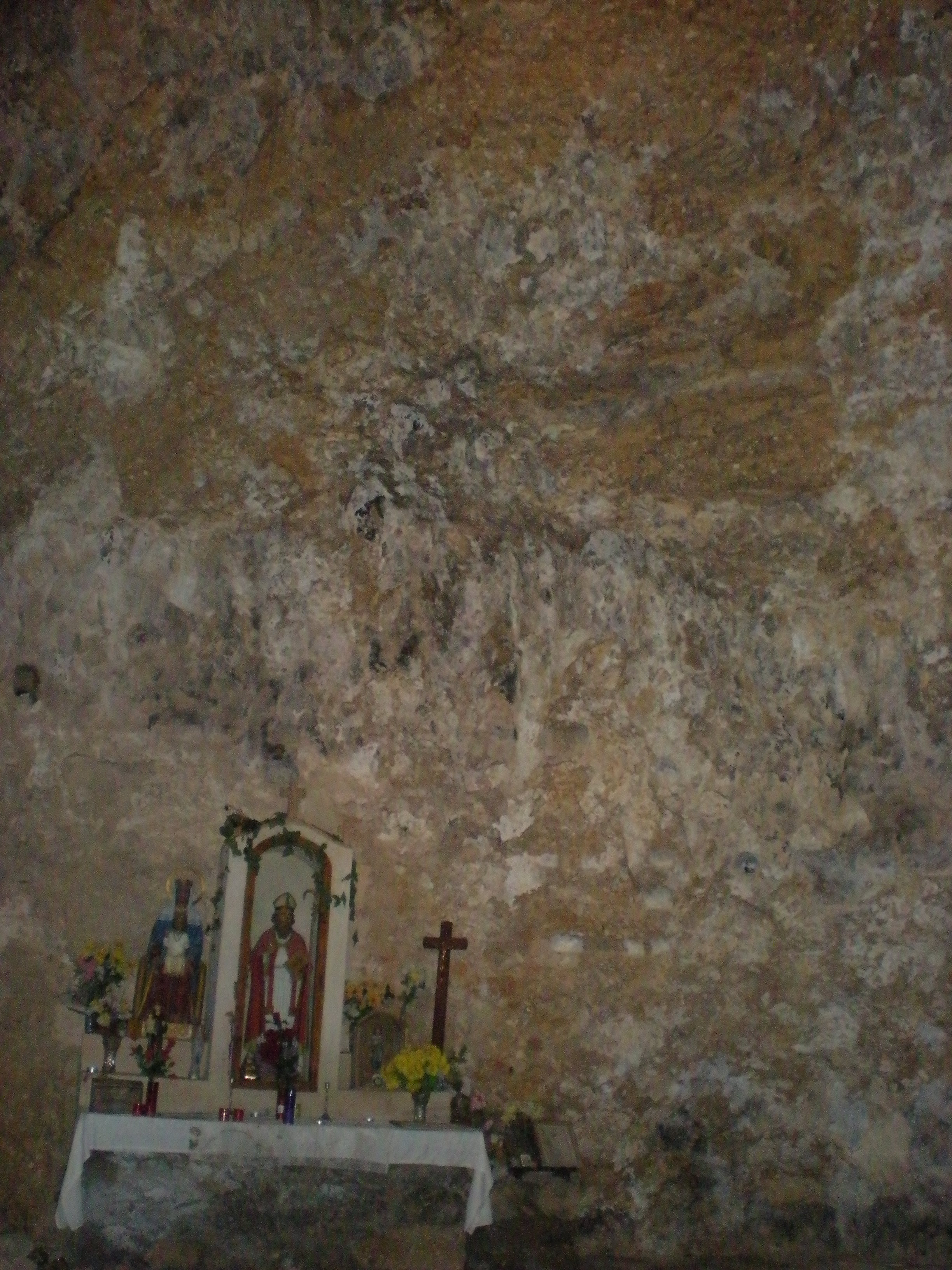 Escultura de San Martín en la ermita de San Martín de la Bal d'Onsera